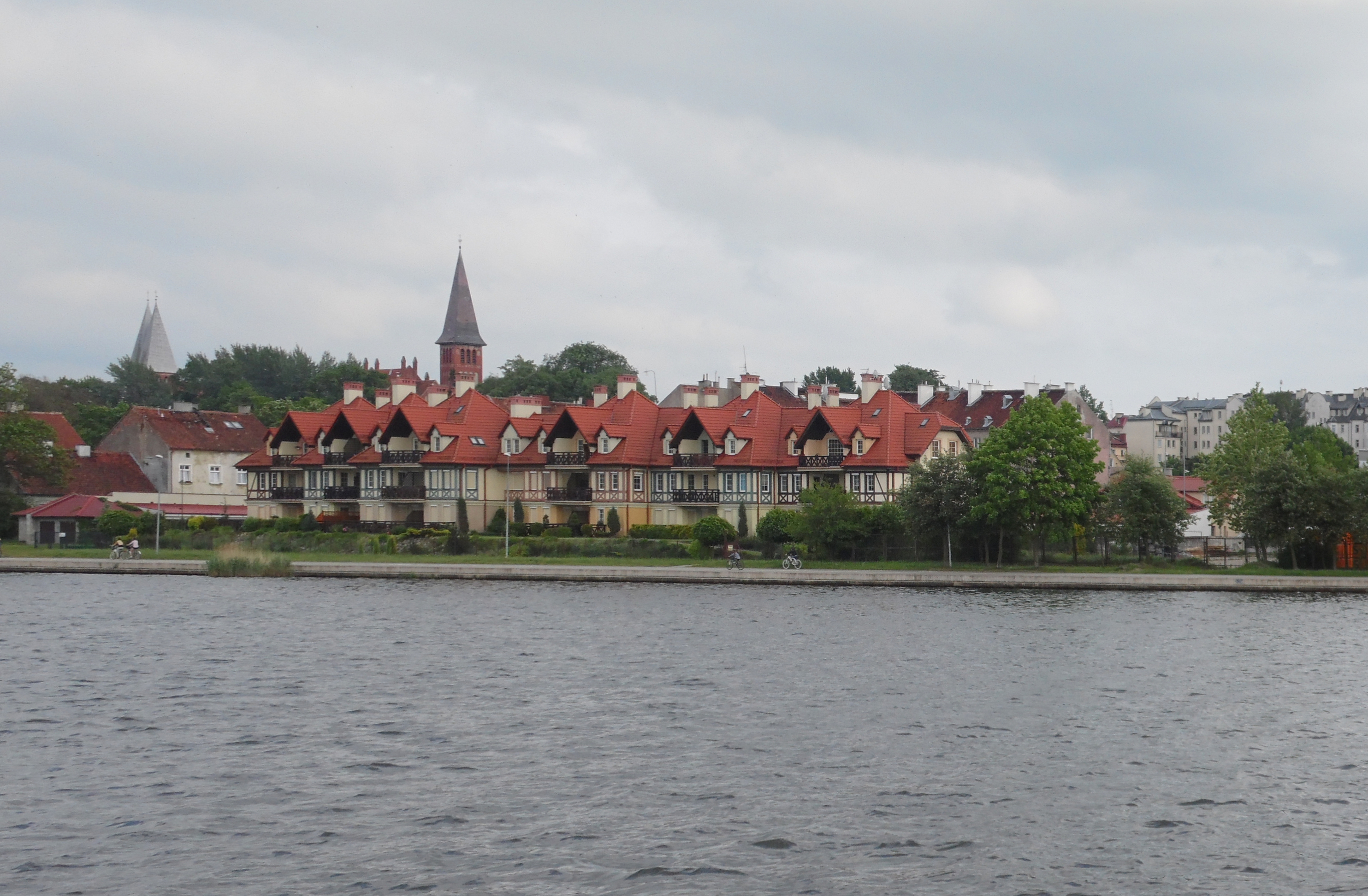 PANORAMA MIASTA WIDZIANA ZE STATKU.